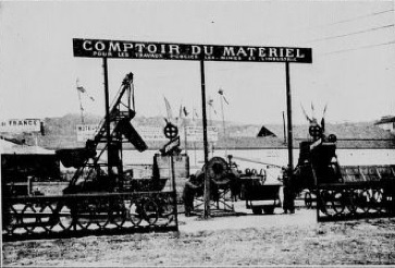 Stand du Comptoir du matériel pour les travaux publics, les mines et l'industrie (Photo Moll)